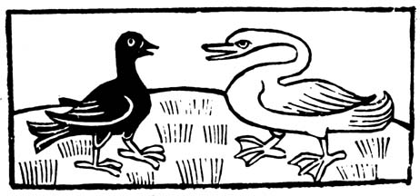 Illustration des Reynke de vos (Anfang des zweiten Buches: Dialog der Vögel); Holzschnitt